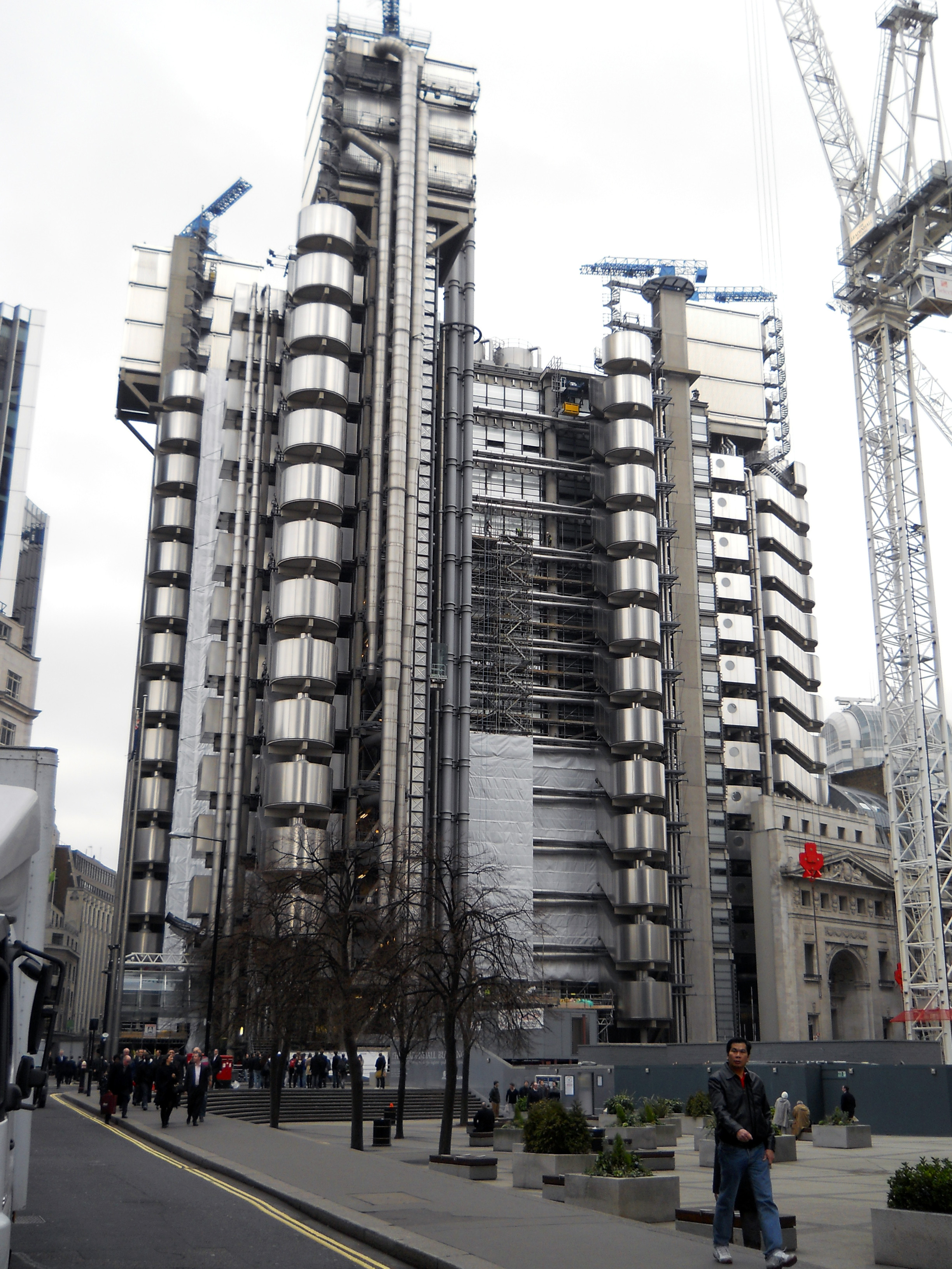 Здание страховой компании Lloyd в Лондоне, архитектор Ричард Роджерс. 1978-1986гг